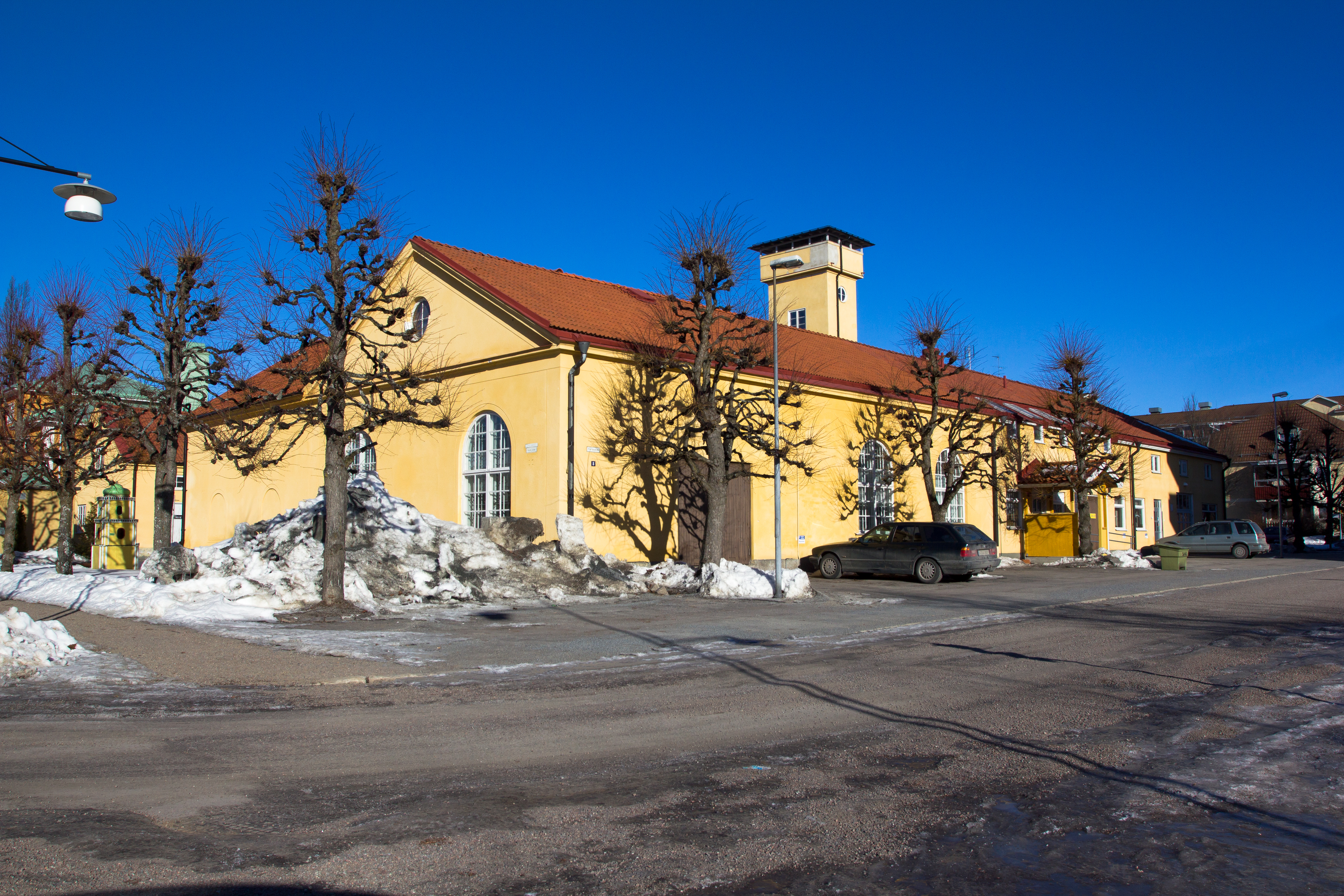 Aguélimuseet, Sala, Sverige